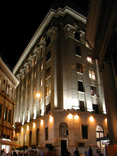 Foto do exterior da Bovespa